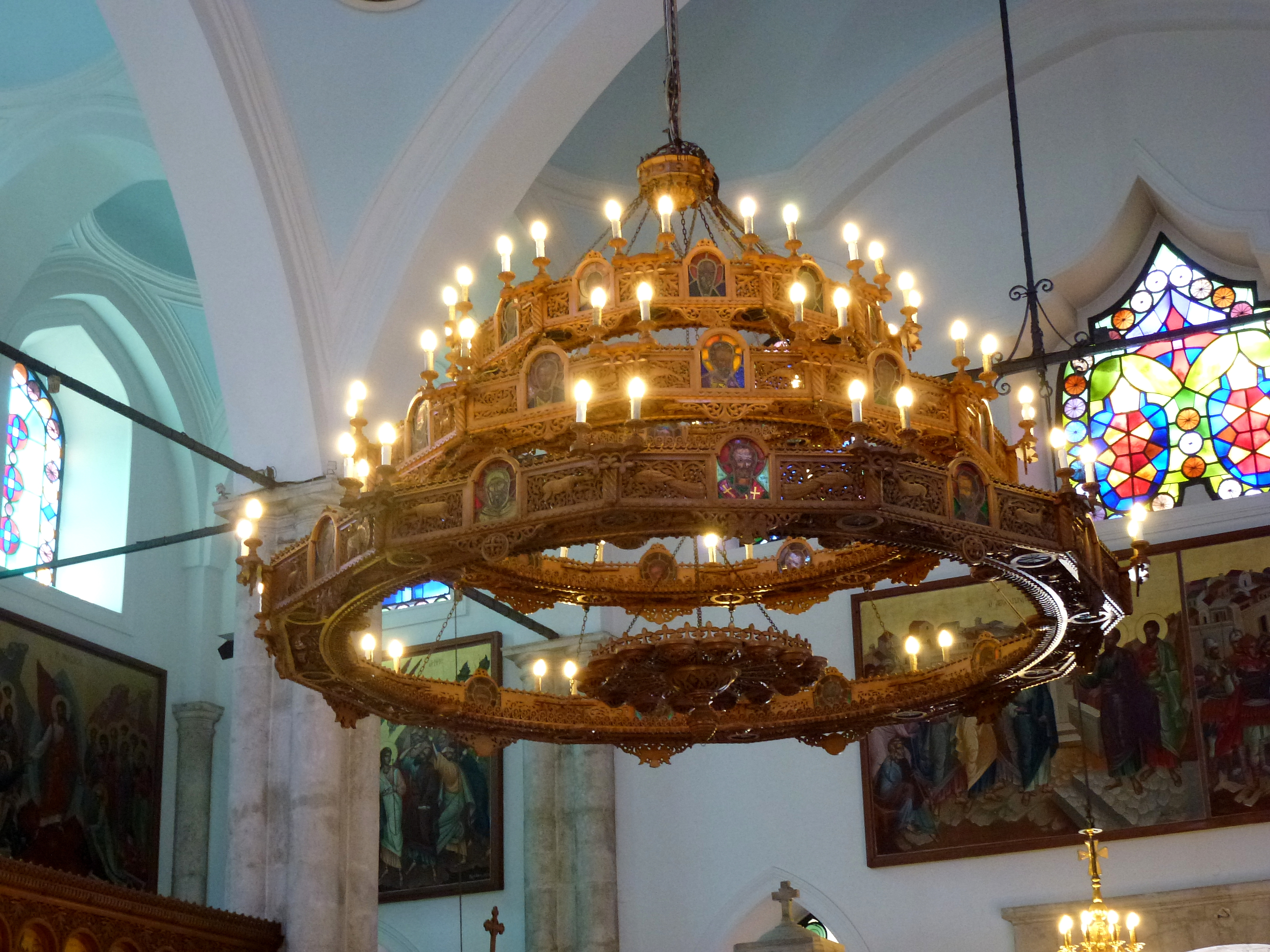 Der 3 stöckige, runde Kronleuchter aus Holz